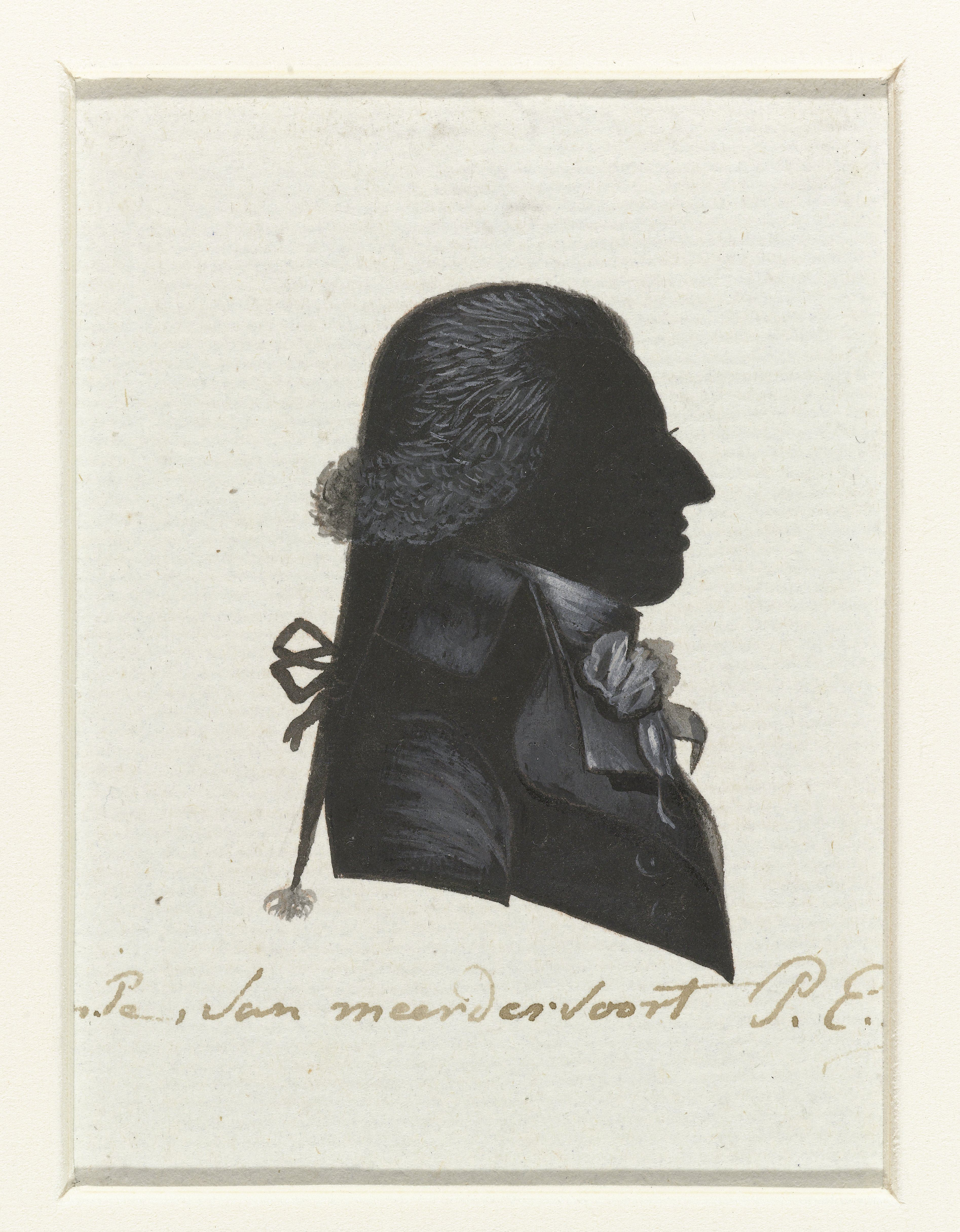 P.E. Pompe van Meerdervoort. Tekening in Oost-Indische inkt, waarschijnlijk gemaakt door Hausdorff. De tekening behoort tot een serie van portretten van afgevaardigden naar de Eerste Nationale Vergadering in 1796-1797. Van de serie werden gravures gemaakt die zijn afgedrukt in "Geschiedenis der staatsregeling, voor het Bataafsche volk", een boek van Cornelius Rogge (1799).